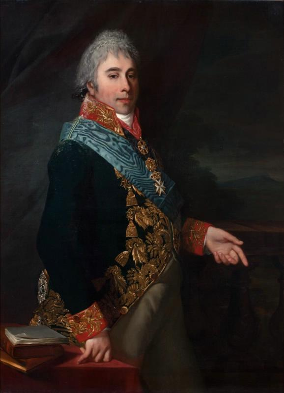 Александро Львович Нарышкин (1760-1826)- обер — камергером и главным директорым Императорских театров.